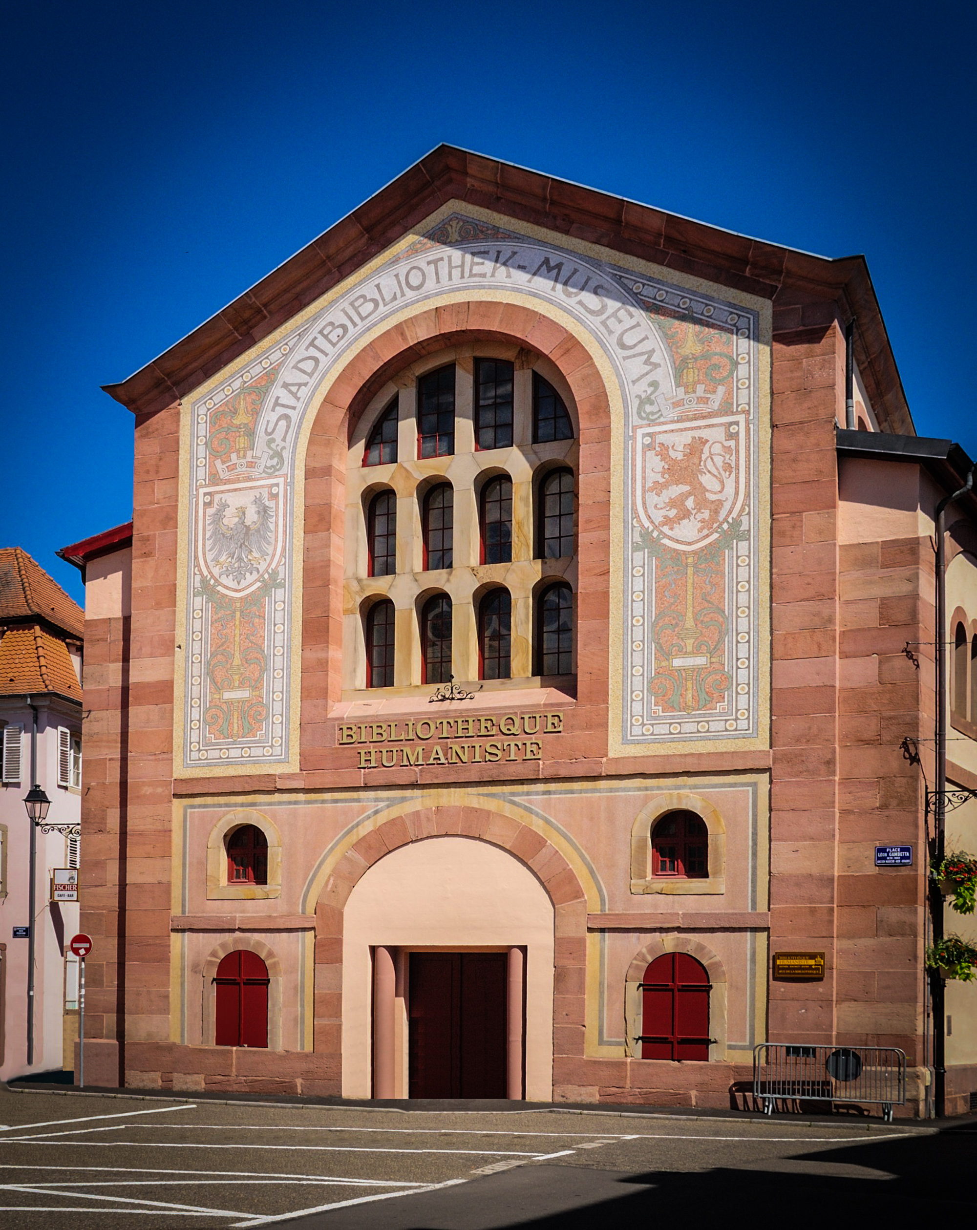 Fassade der Humanistenbibliothek in Schlettstadt